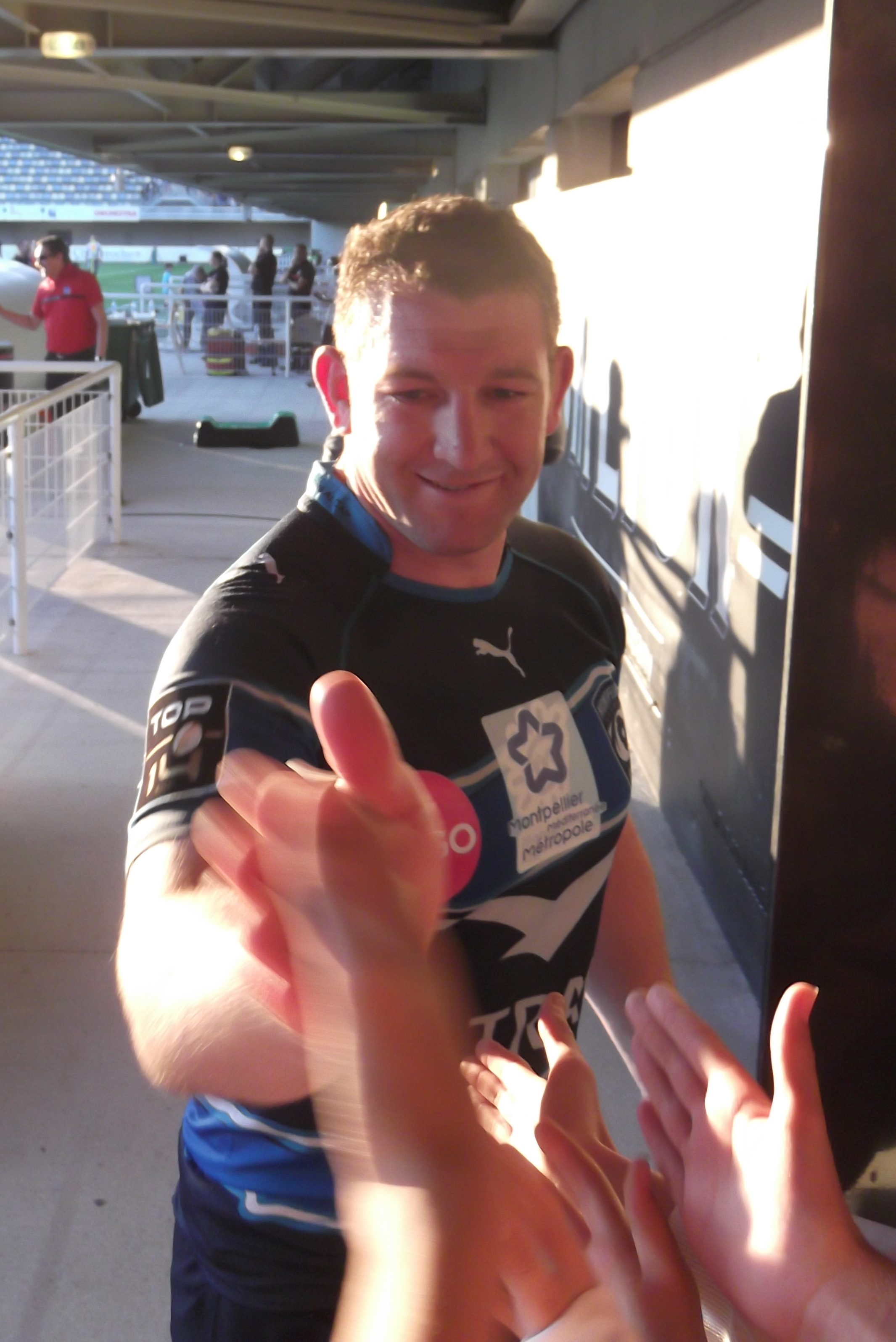 Chris King (Montpellier), mai 2015.